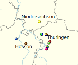 Vergleich der Mittelpunkte Deutschlands abhängig von der Berechnungsmethode